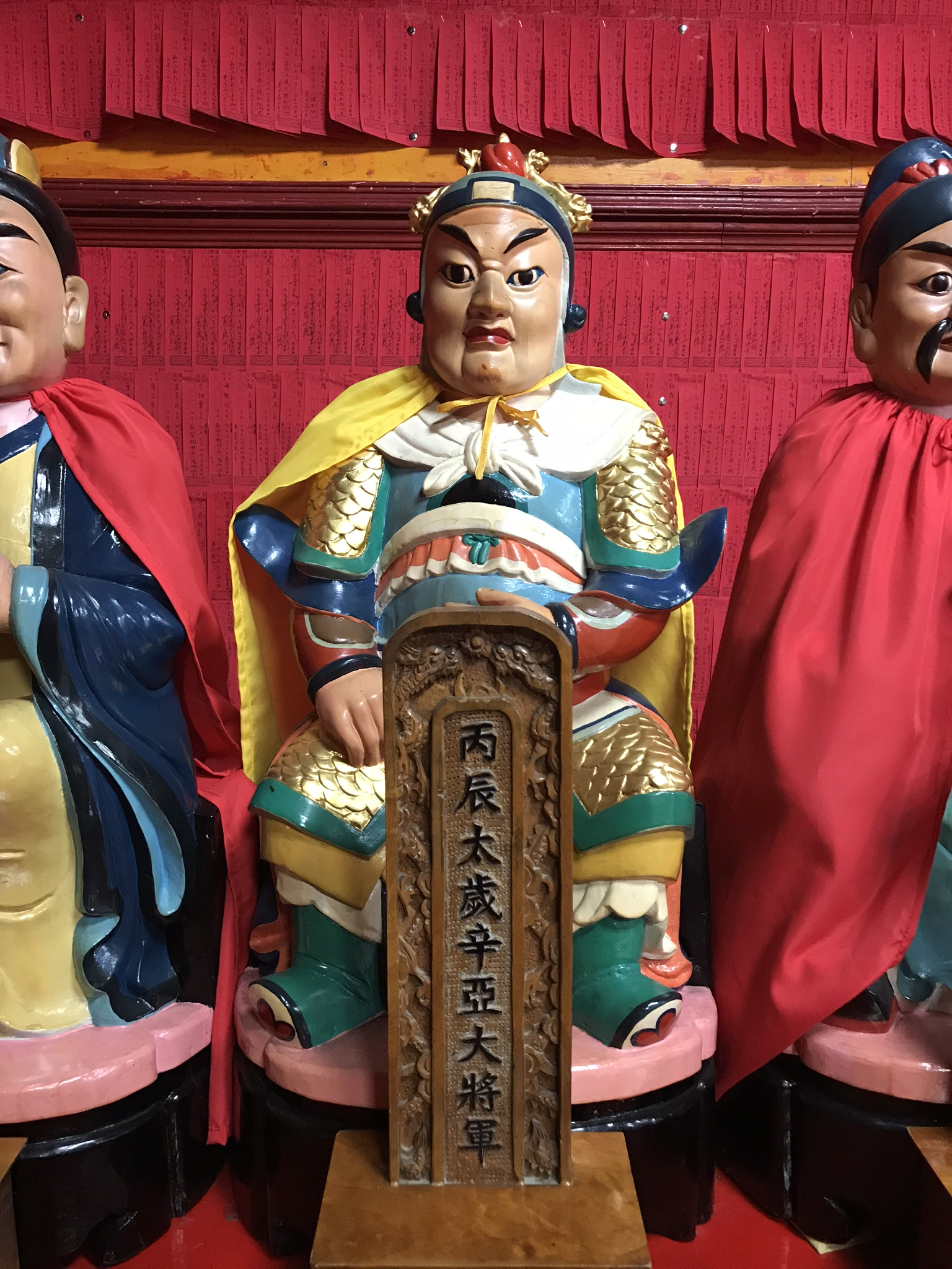 丙辰太歲辛亞大將軍神像